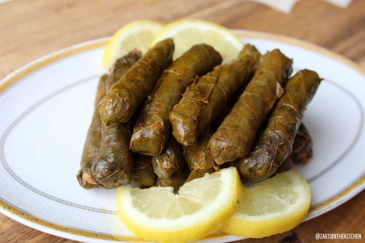 De Turkse variant van de Sarma